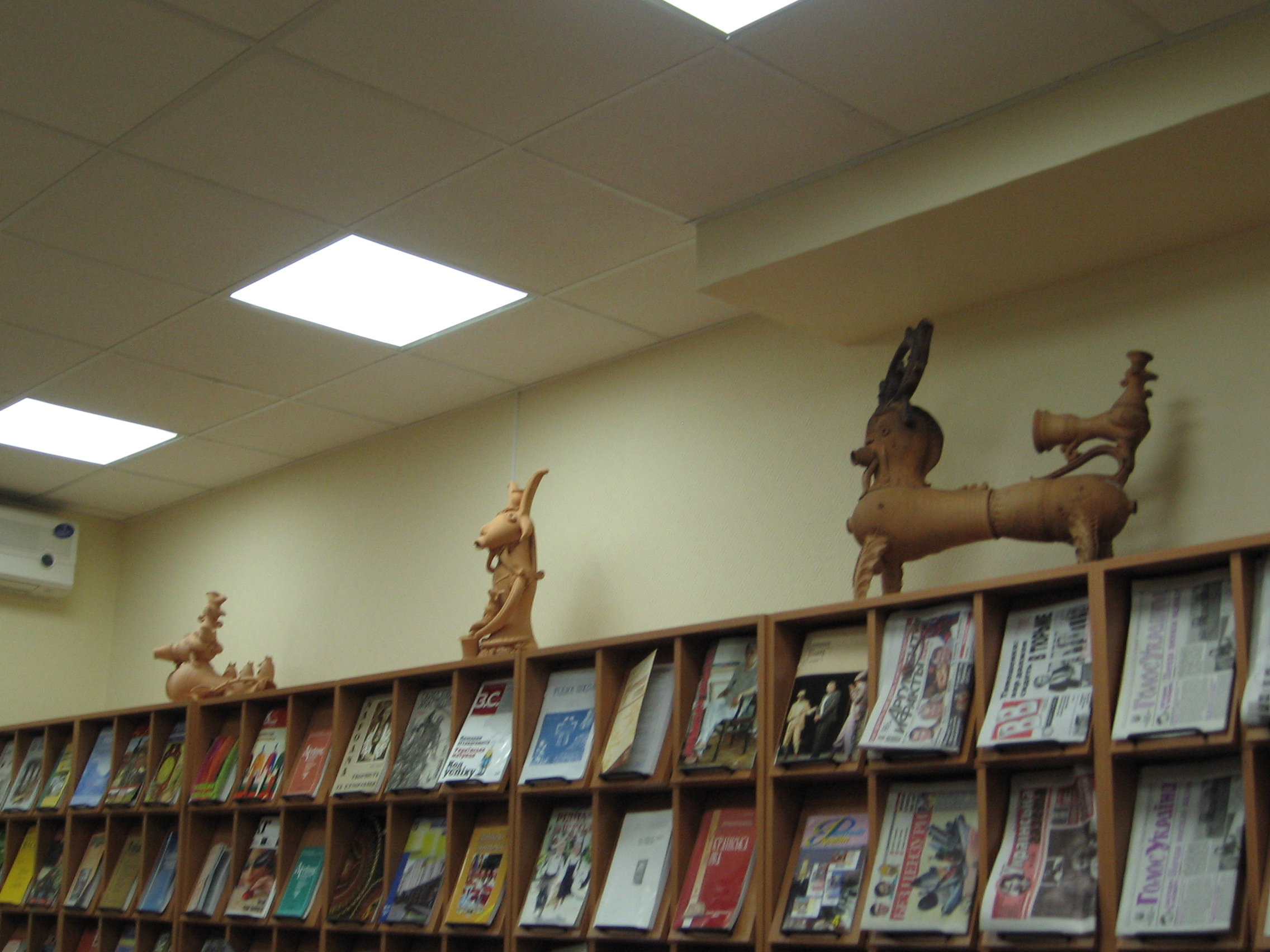 Книжная выставка в Библиотеке украинской литературы в Москве